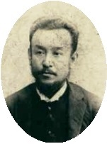 薩埵正邦像